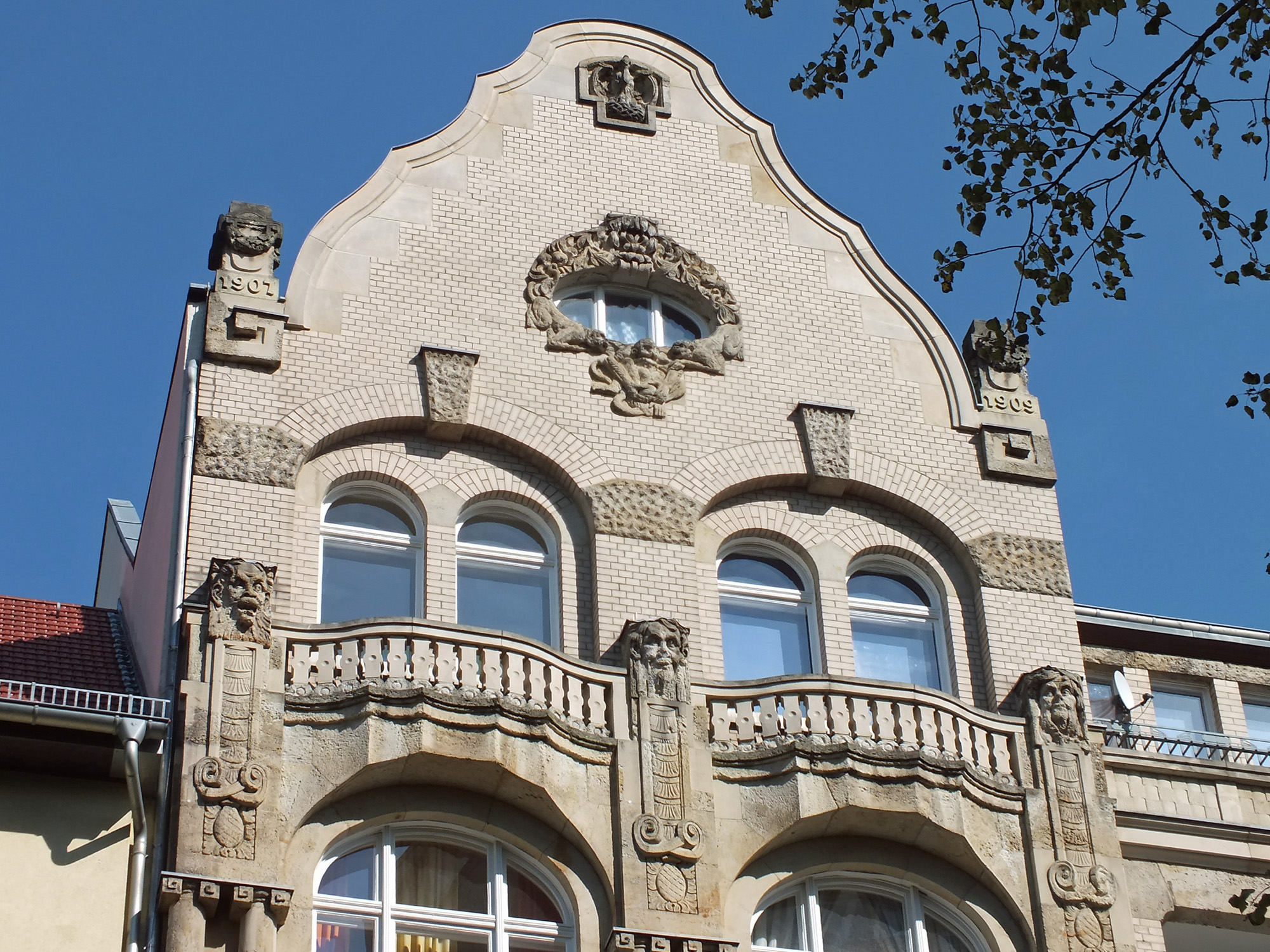 Giebel des „Märchenhausses“ in Leipzig, Philipp-Rosenthal-Straße 21